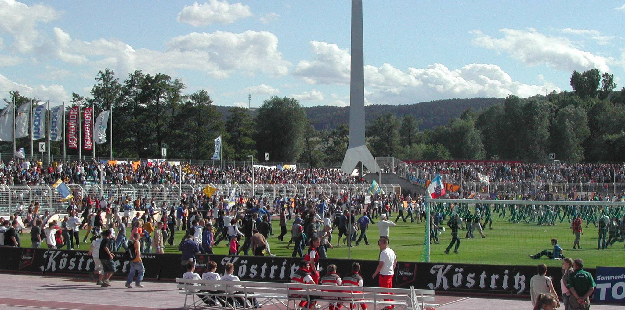 Ernst-Abbe-Sportfeld. Nach dem Aufstiegsspiel gegen MSV Neuruppin. Der FC Carl-Zeiss-Jena hat den Aufstieg in die Regionalliga gesichert.